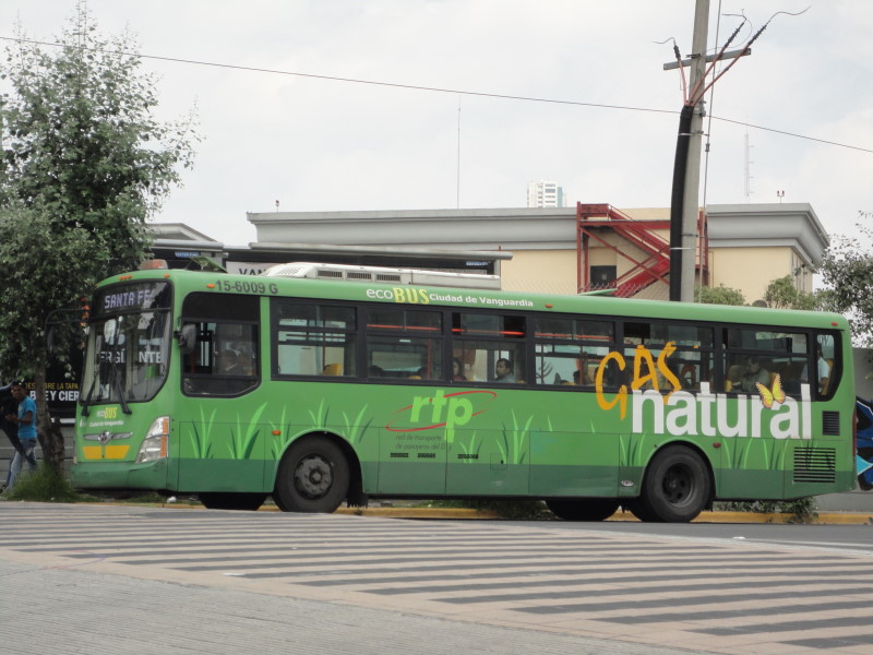 Uno de los autobuses Hyundai Super Aero City impulsado a Gas Natural Comprimido, que cubre la ruta verde Balderas - Santa Fe